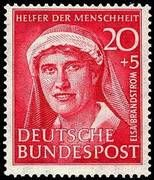 Elsa Brändström (timbre RFA / Briefmarke BRD)